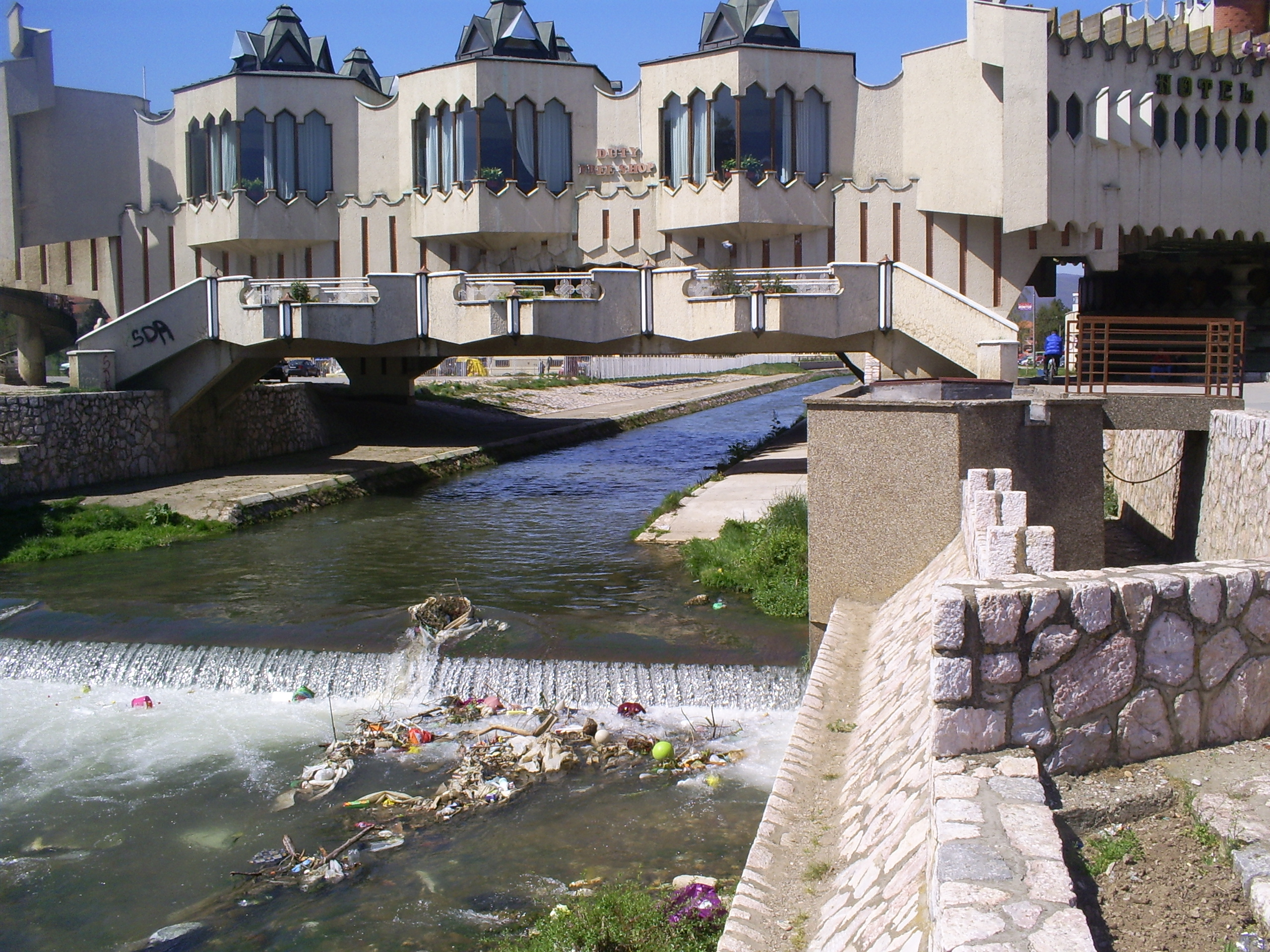 Reka Raska u Novom Pazaru